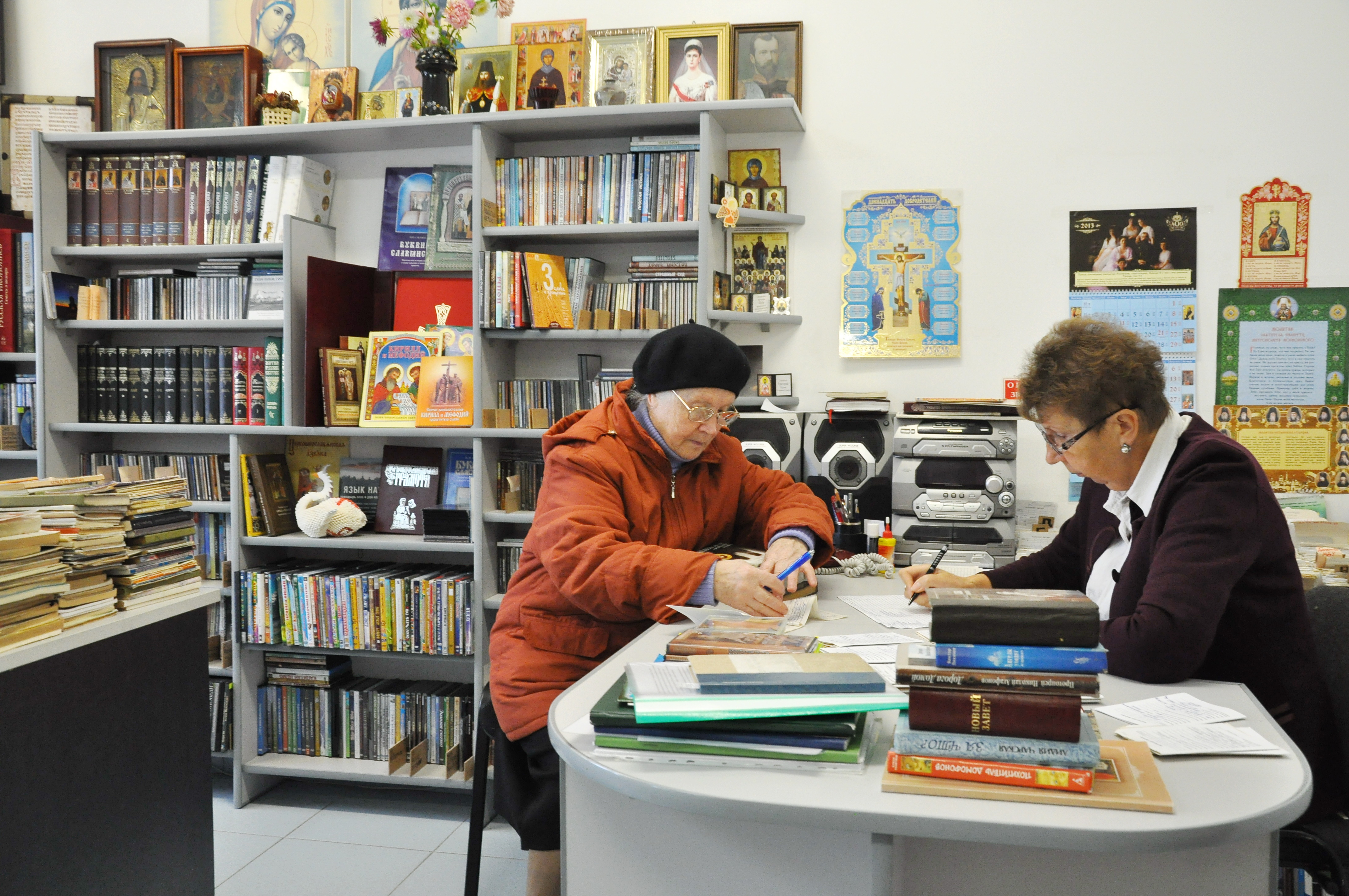 Библиотека Белорусского Экзархата